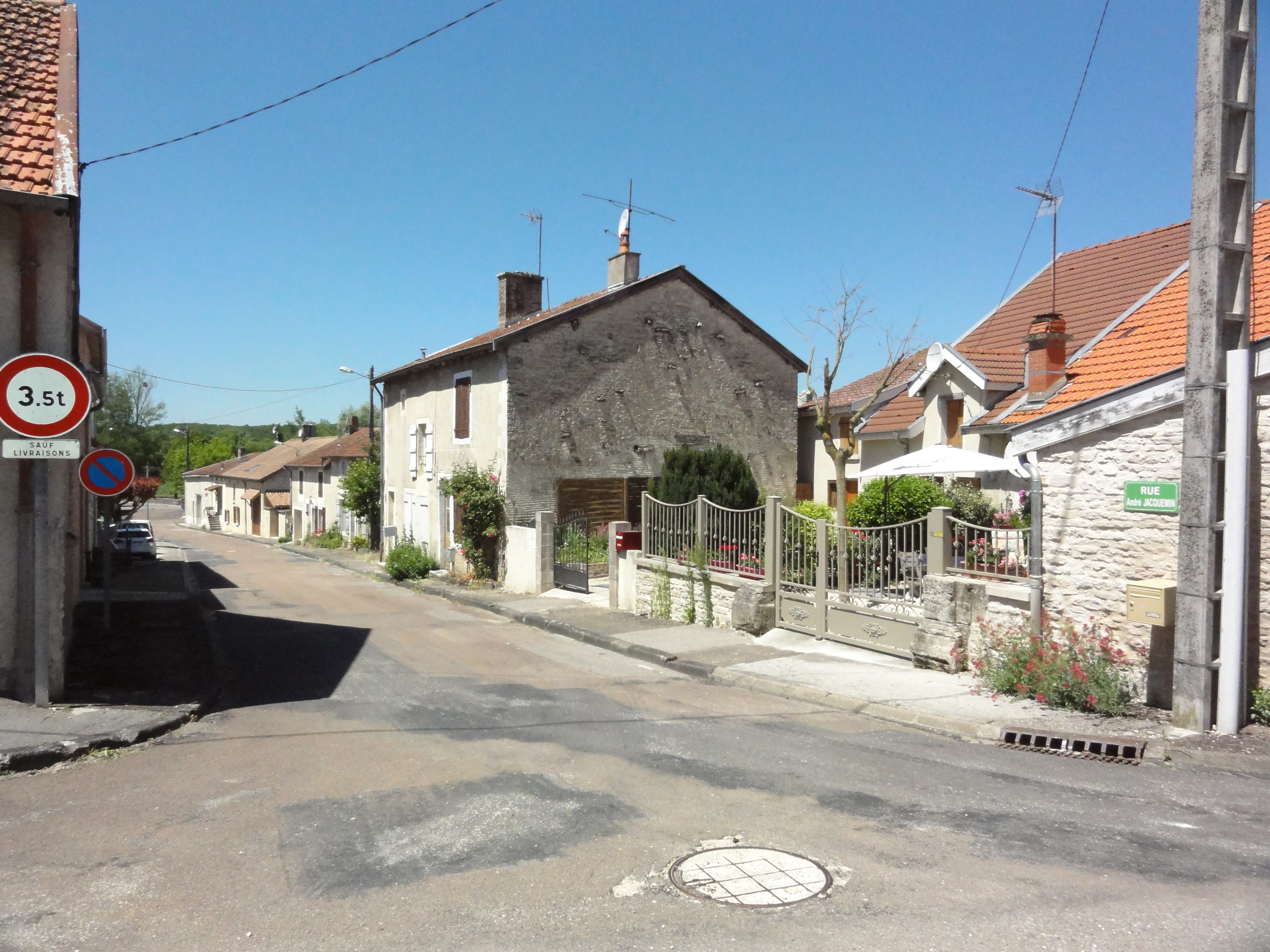 Saucourt-sur-Rognon, rue André Jacquemin